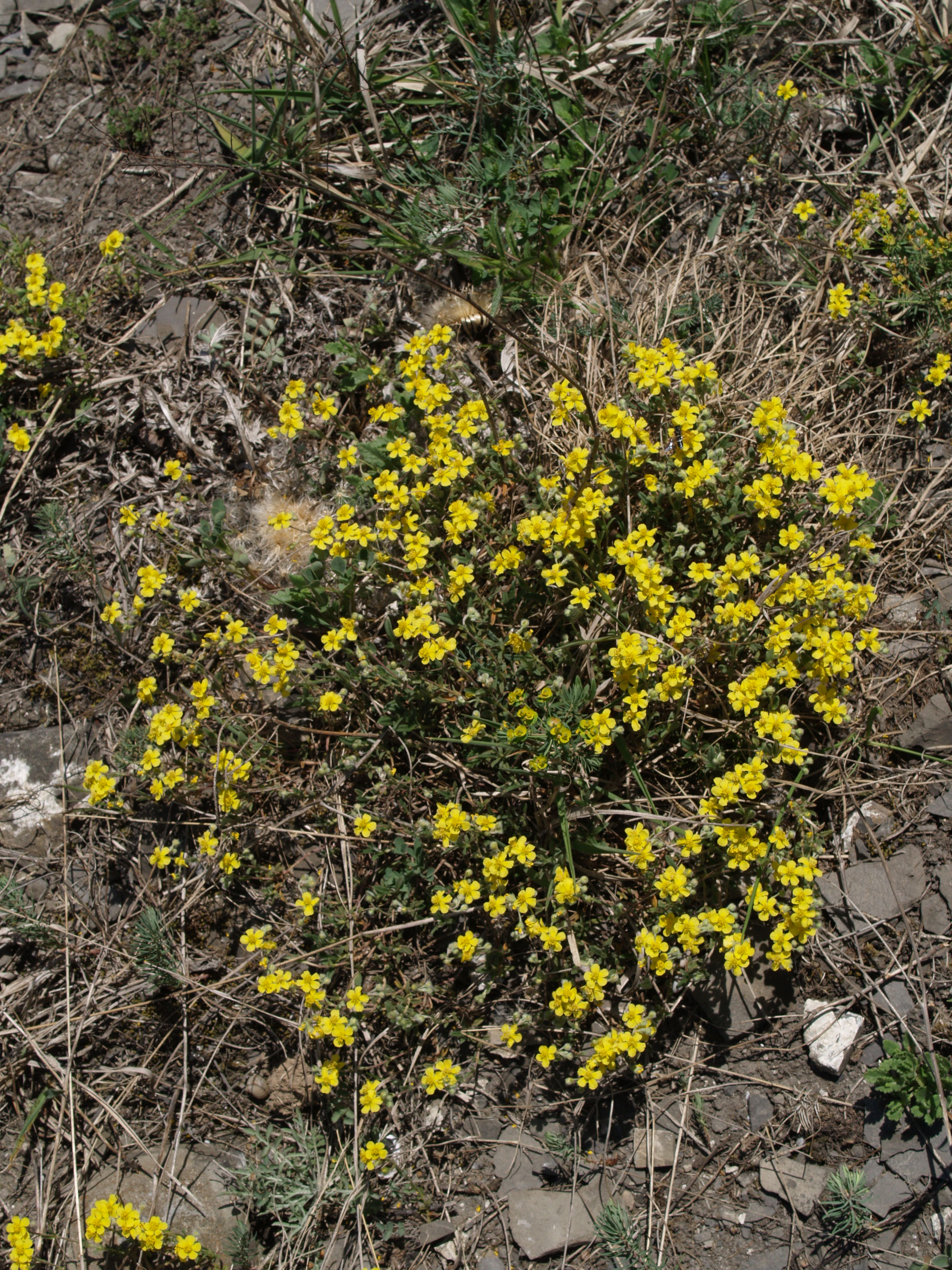 Homolka (přírodní rezervace) - jaro - Helianthemum canum (L.) Baumg., devaterník šedý - status ohrožení v ČR: C2 (silně ohrožený)